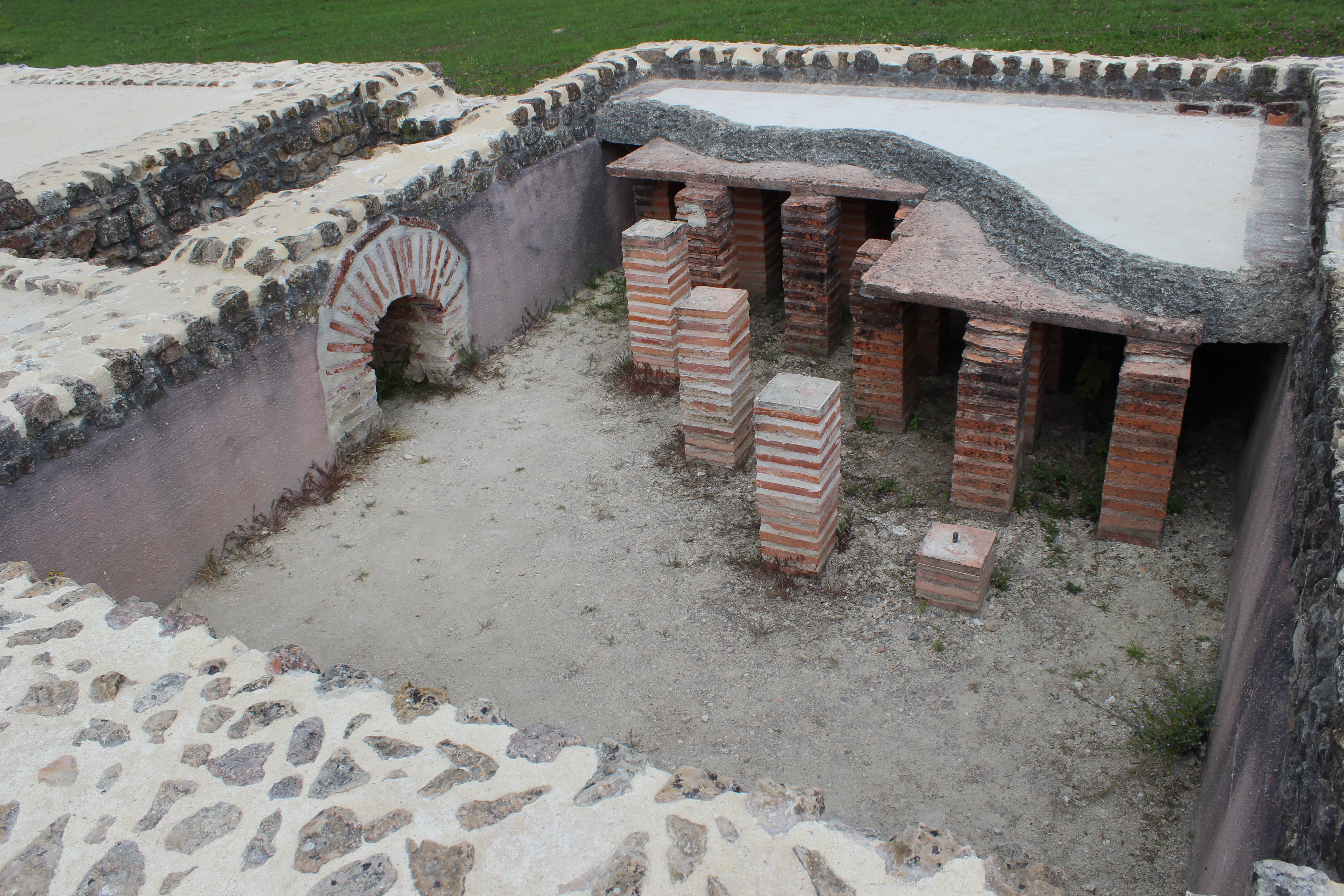 Pilettes et praefurnium de la maison au grand péristyle de Vieux-la-Romaine (Calvados, Normandie, France).